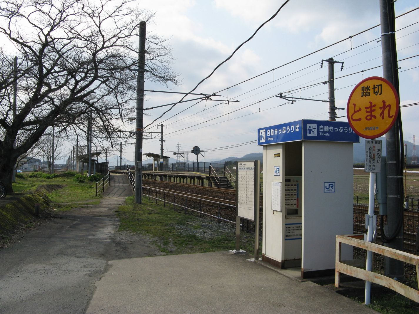 山陰本線 高津駅 駅東側から西望 手前が福知山・豊岡方面への2番のりば